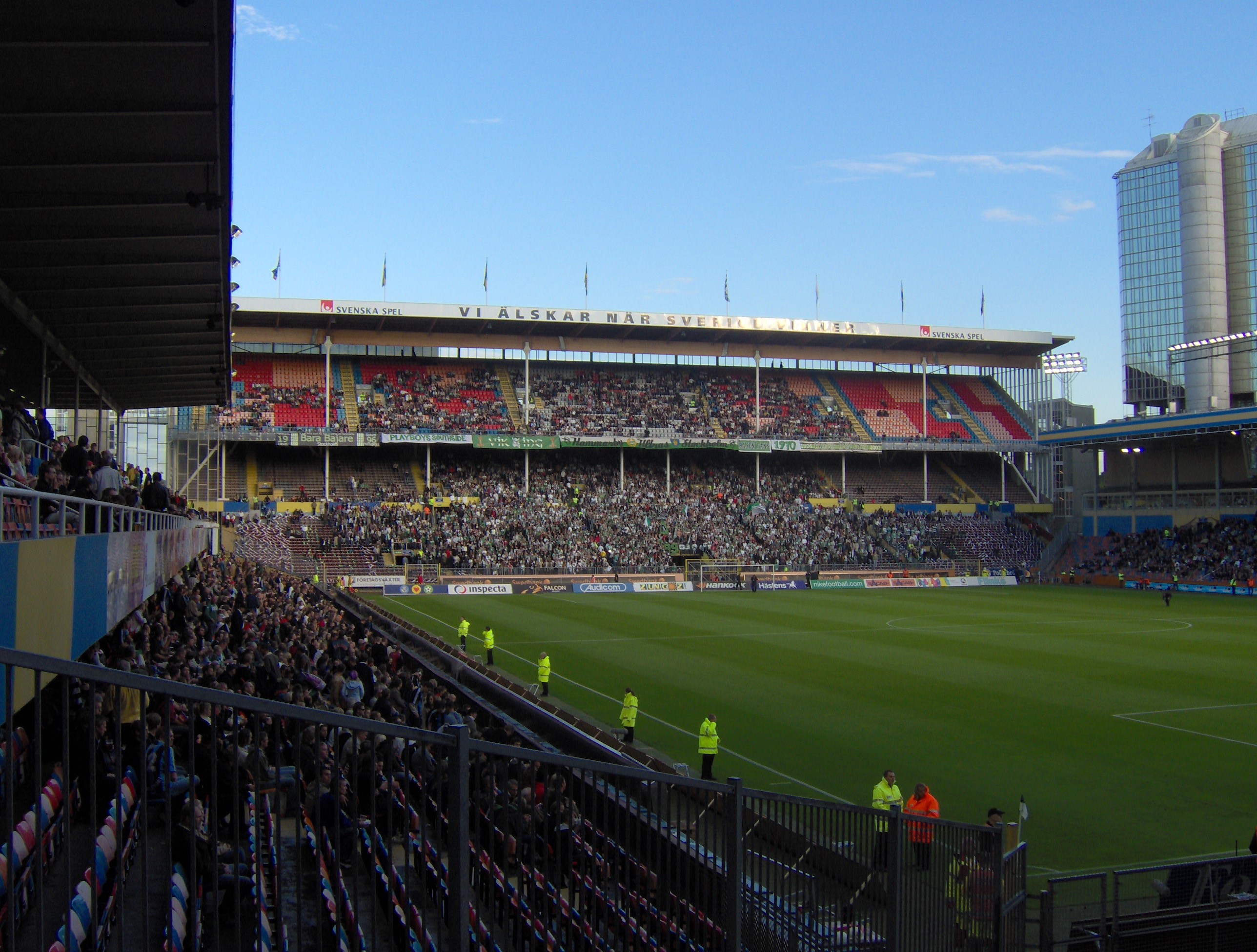 East, South and West stand at Råsunda before the Fotbollsallsvenskan derby game between Hammarby IF and Djurgårdens IF (2-0).